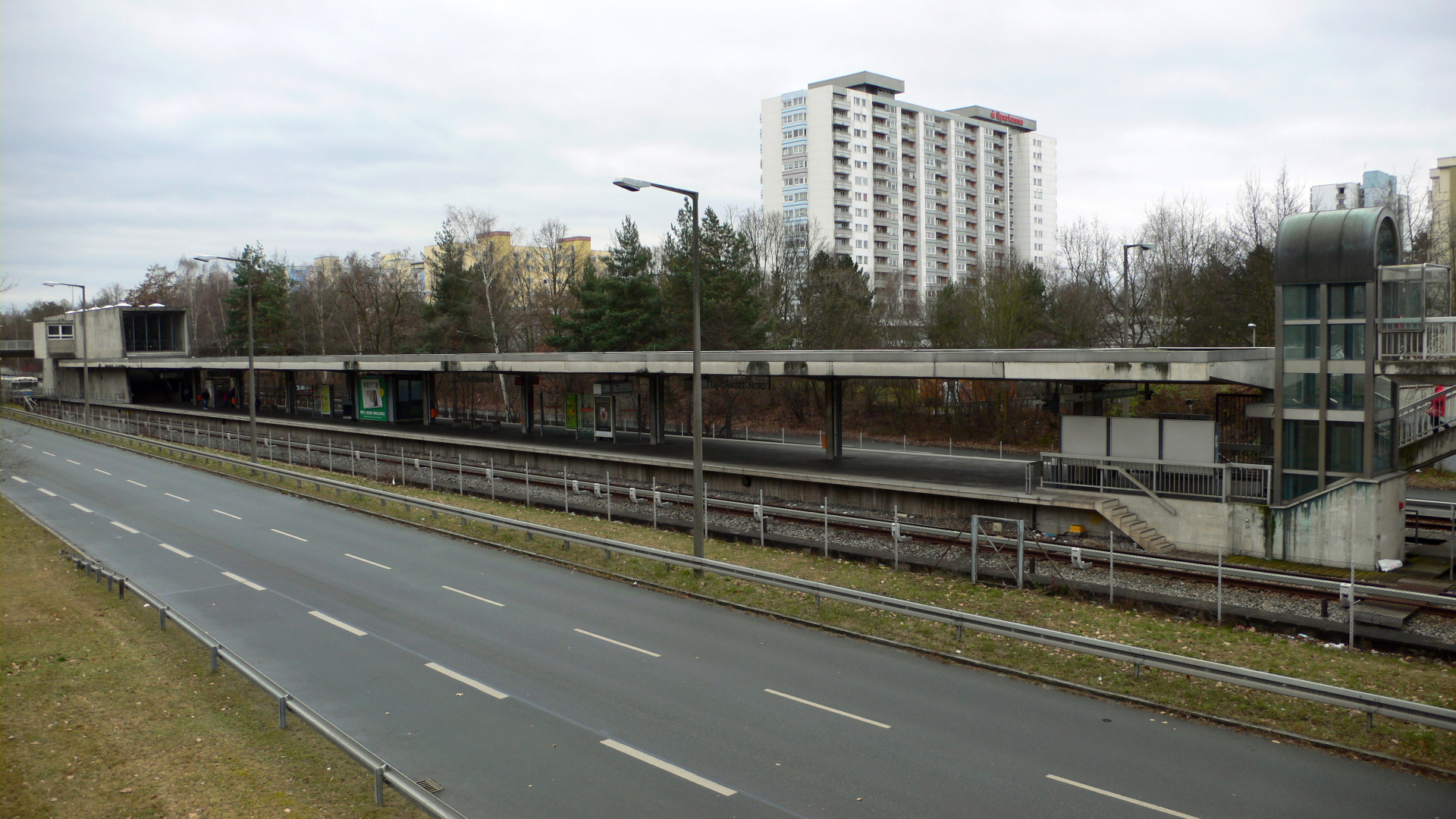 U-Bahnhof Langwasser Nord der U-Bahn Nürnberg, Außenansicht, Blick von Norden